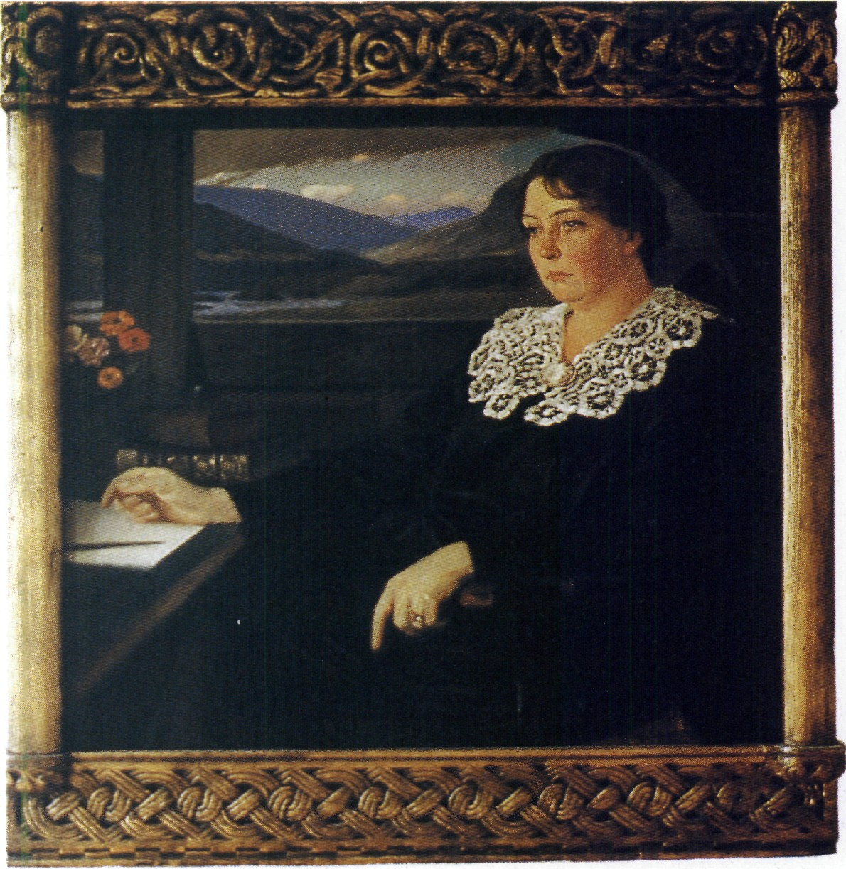 udsnit af "Portræt af Sigrid Undset"